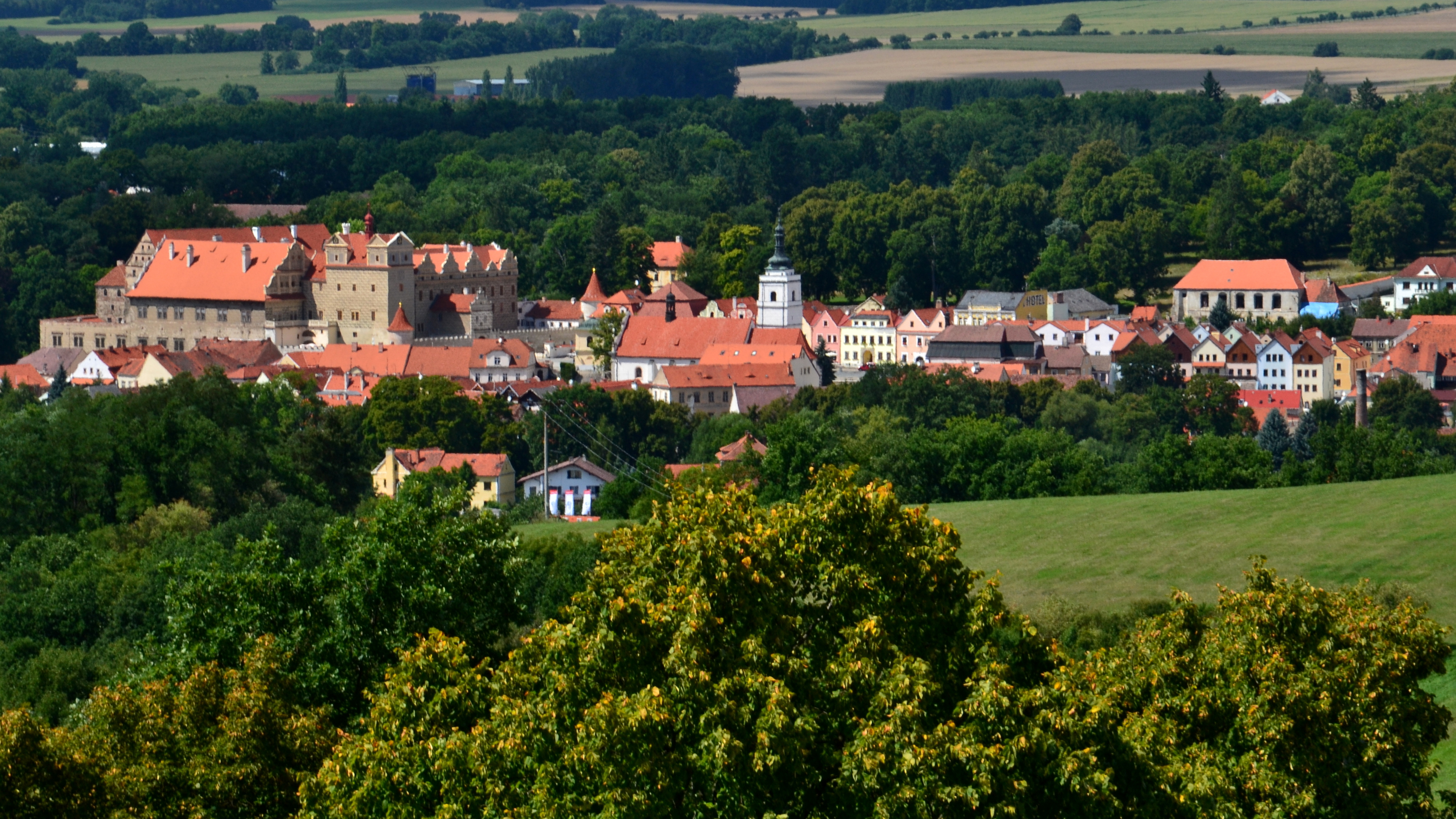 Horšovský Týn – pohled na město ze Šibeničního vrchu